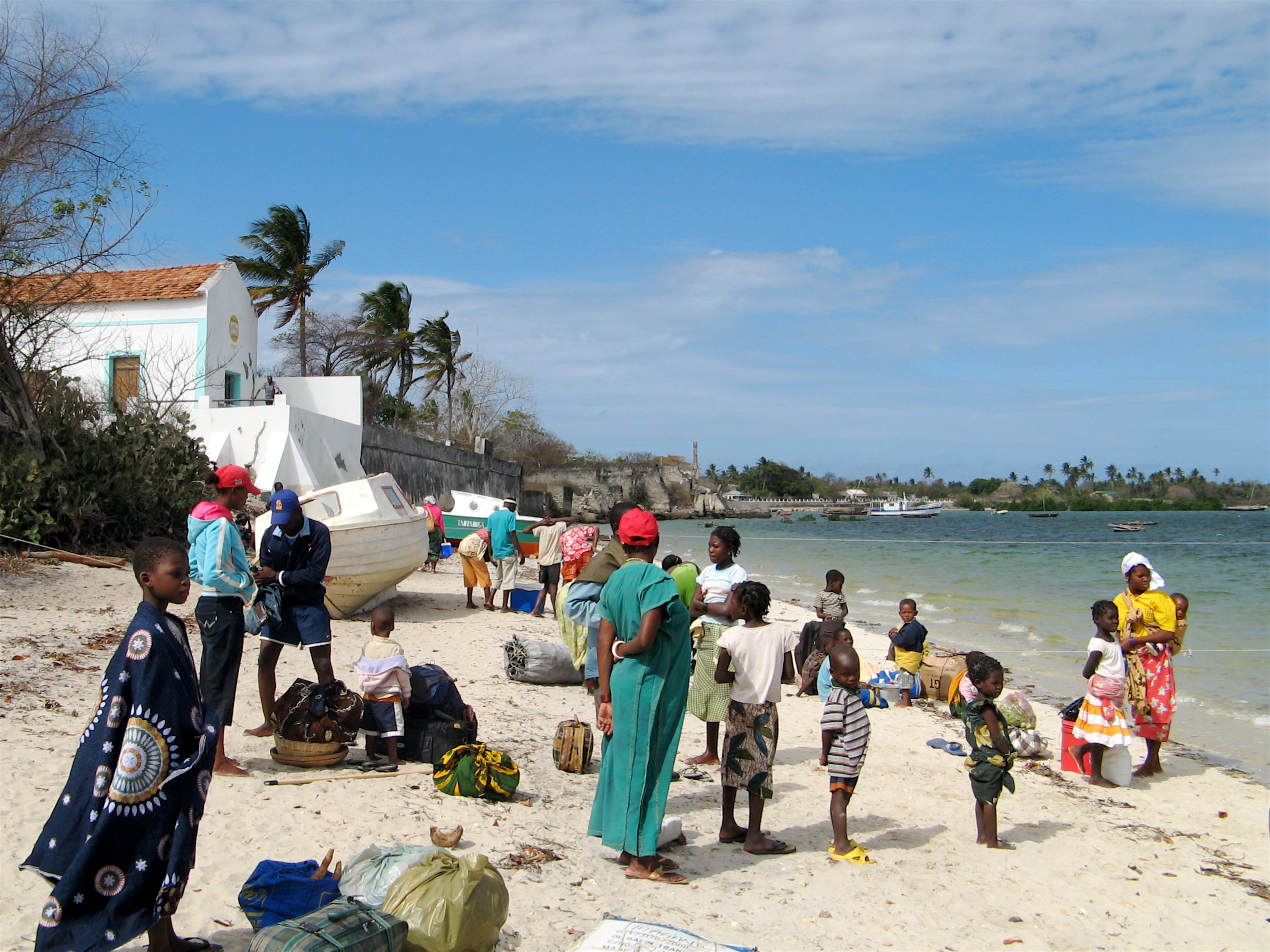 llha do Ibo, Moçambique [2009]